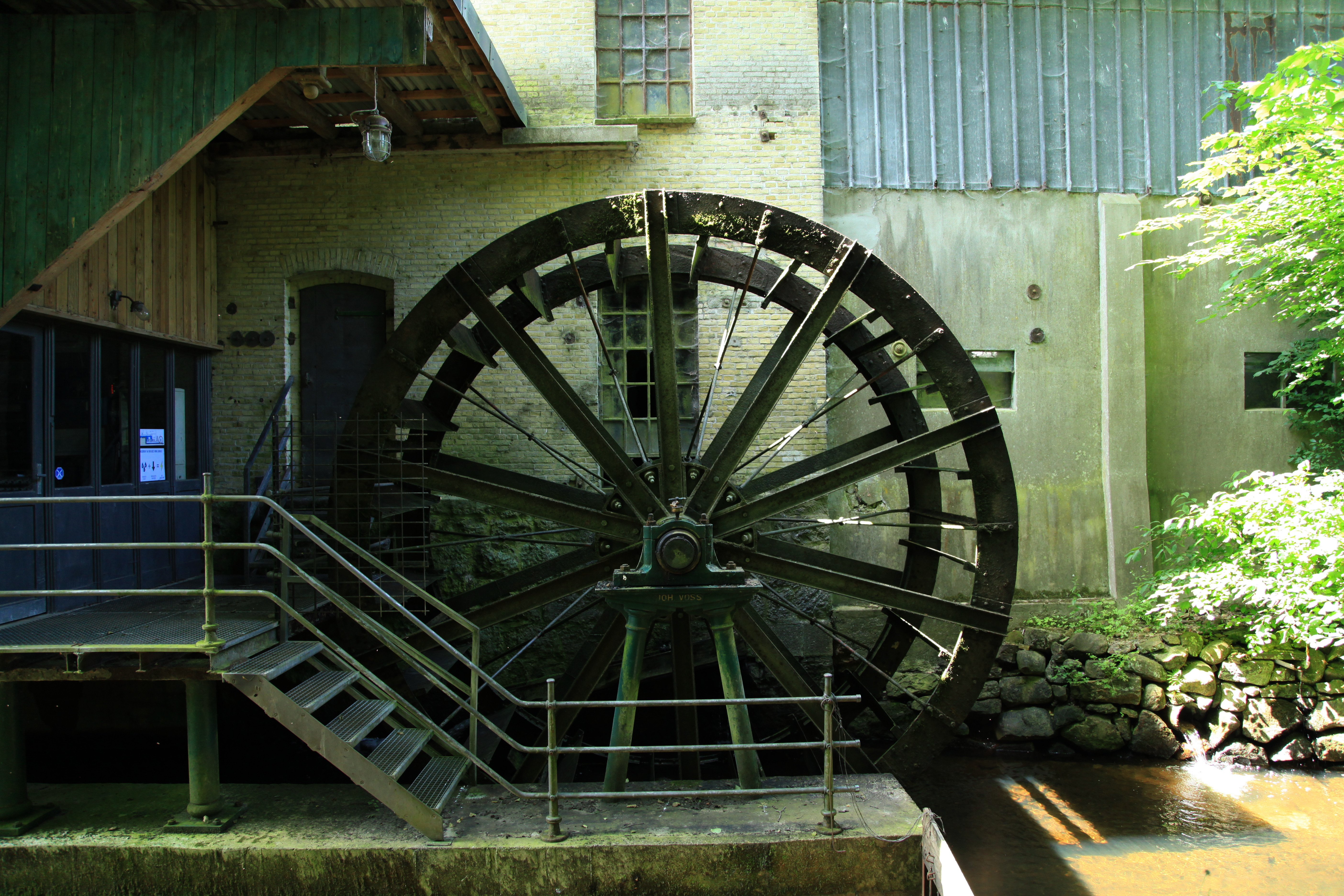 Selker Mühle, Mühlenweg in [Selk